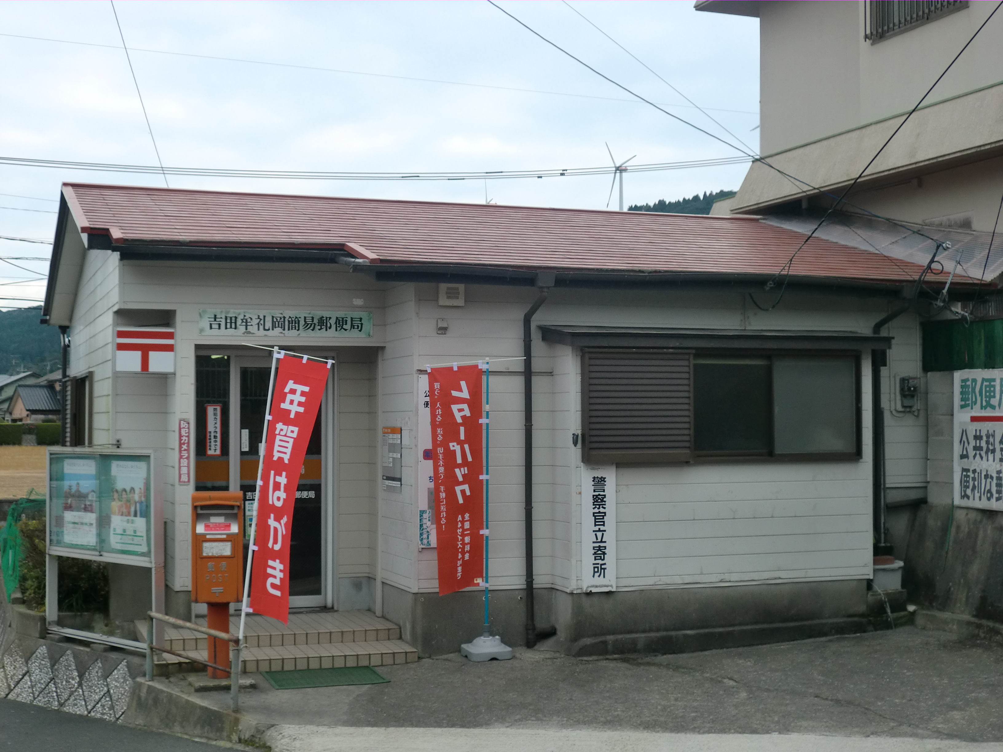 鹿児島市にある吉田牟礼岡（よしだむれがおか）簡易郵便局